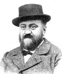 Amédée Bollée père, Histoire de l'automobile, Pierre Souvestre, éd. H. Dunod et E. Pinat, 1907 (ASIN B001BPBE58) p.126